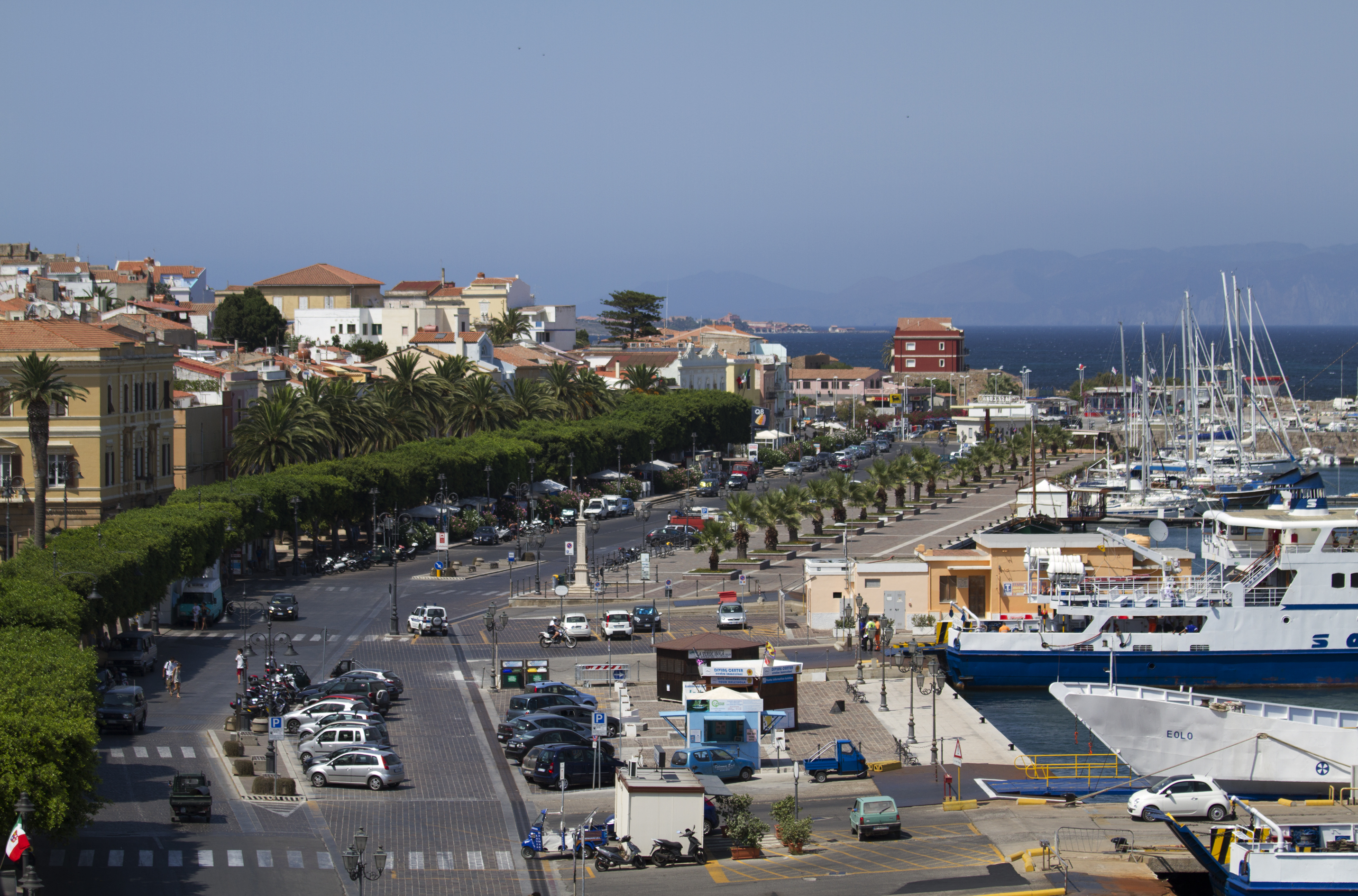 Lungomare, Carloforte, Isola di San Pietro, Carbonia-Iglesias, Sardinia, Italy